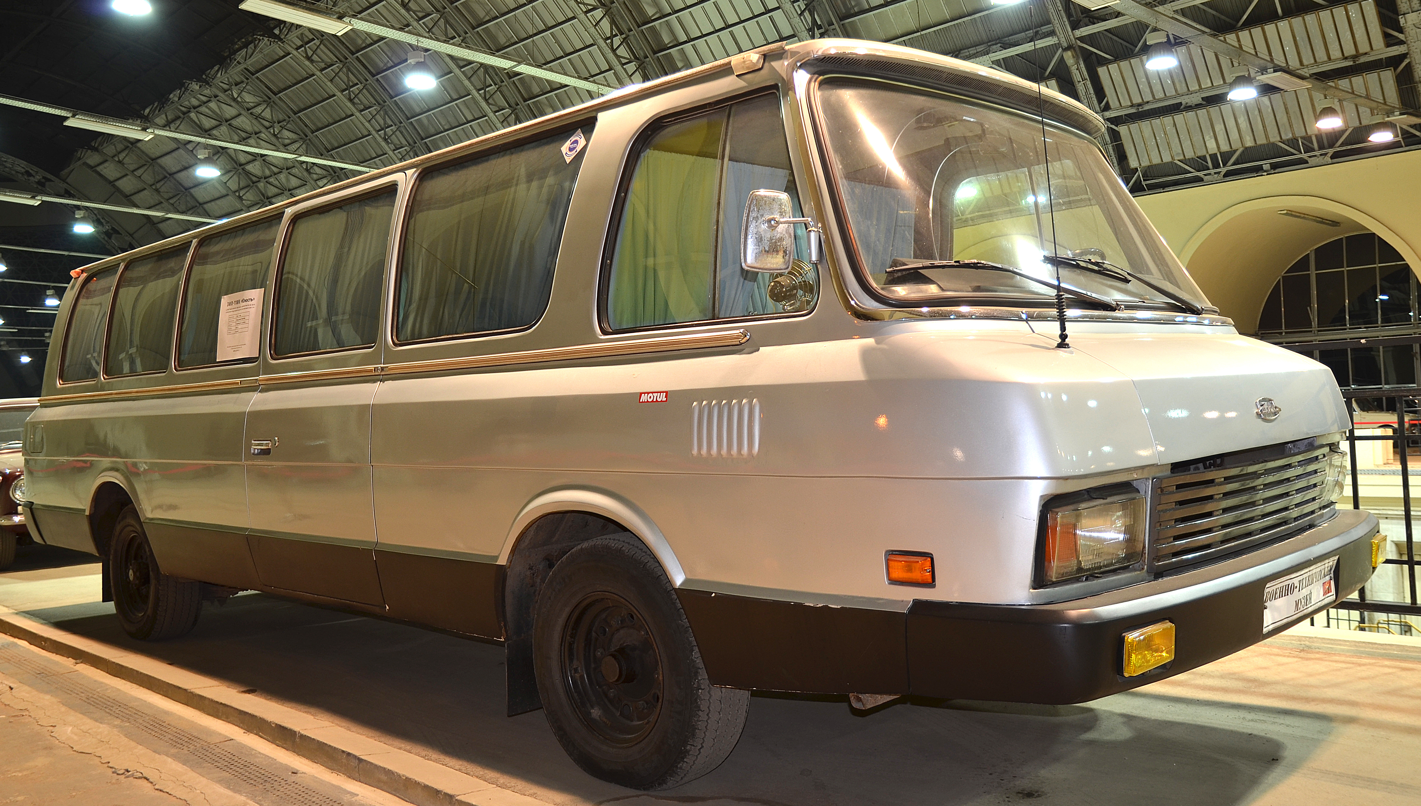 Можно увидеть здесь : You can see here